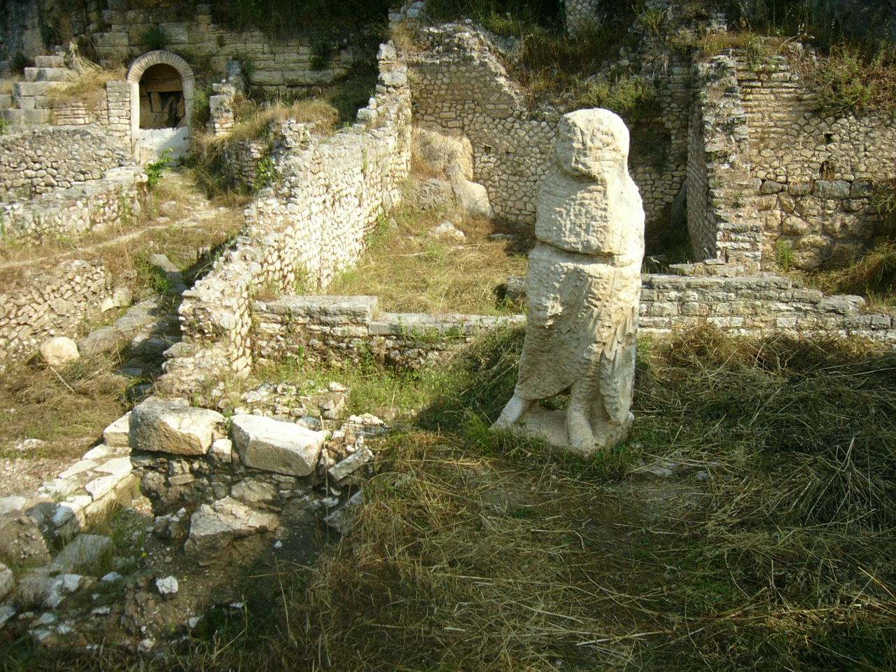 Butrint, Albania: Prytaneion